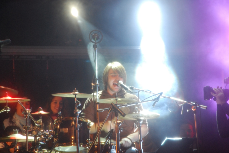 Federico Sassudelli dei Bastard Sons of Dioniso al concerto di X Factor a Trento.